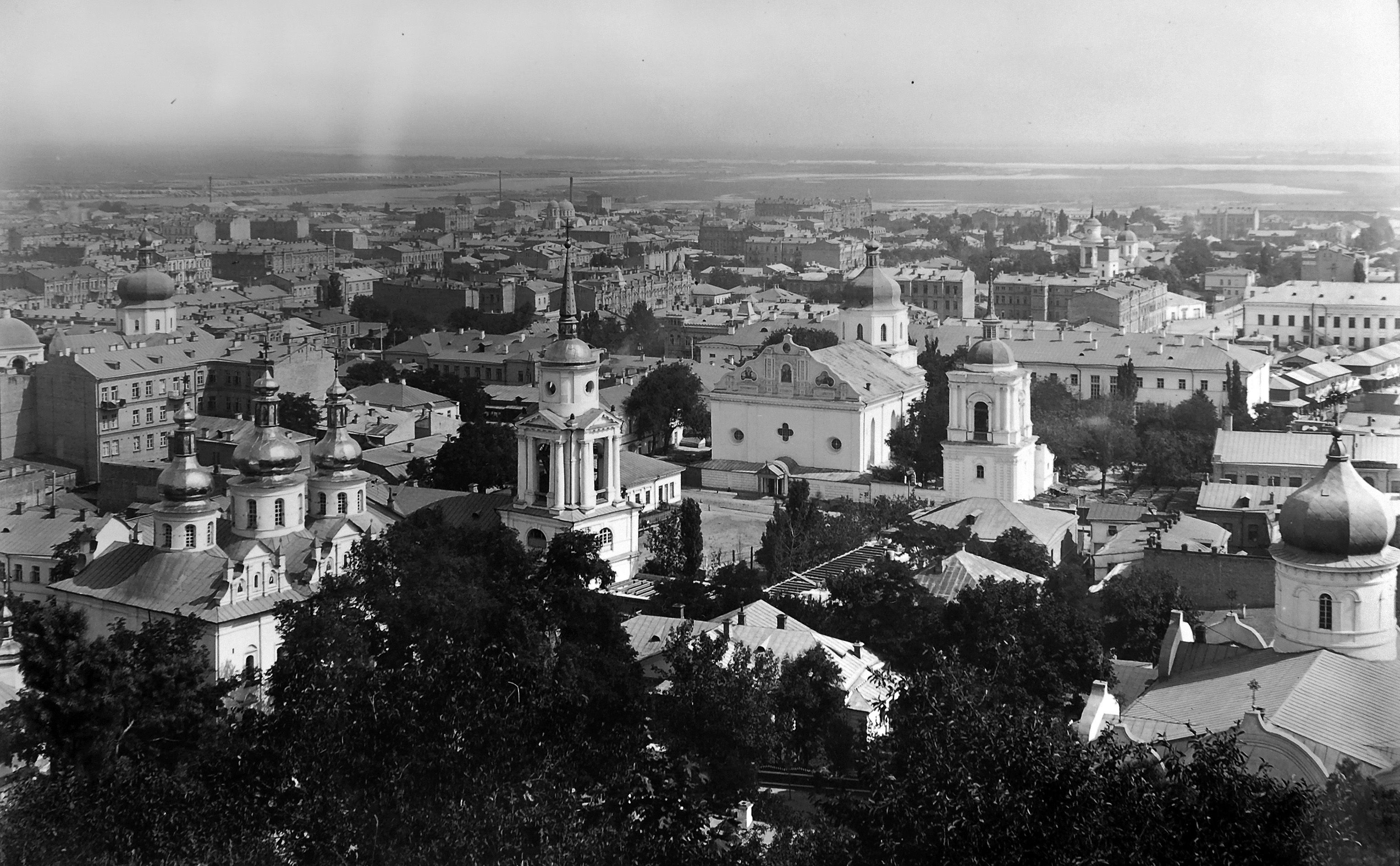 Фото кінця 19 ст. Собор Вознесенського монастиря ще має грушовидні бані. На другому плані видно церкви Петропавлівську (знищена) та Миколо-Притискську (збережена). На задньому плані височіє комплекс Богоявленського собору (знищений).